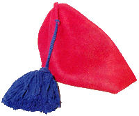 Fez da bersaglieri, esercito italiano